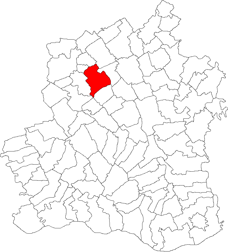 Categorie:Hărţi ale judeţului Teleorman